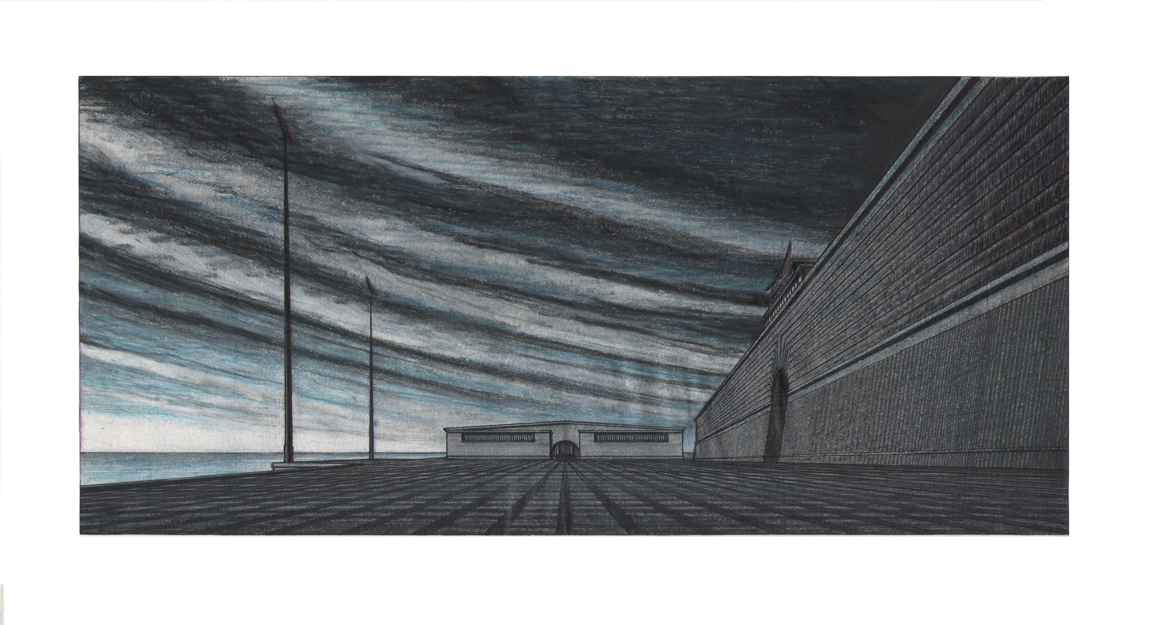 Arnaldo Dell'Ira (1903-1943), Veduta di piazza sul mare a Livorno, progetto non realizzato del 1938, Archivio Dell'Ira